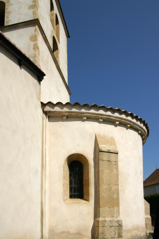 Chevet de l'église de Ligny-en-Brionnais